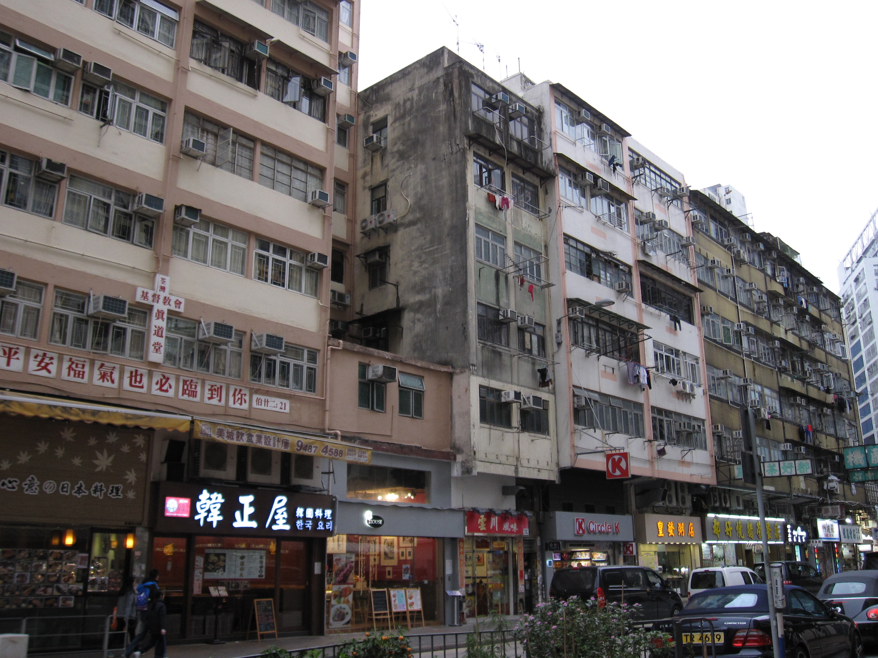 中文（香港）: 德仁樓第十二期。